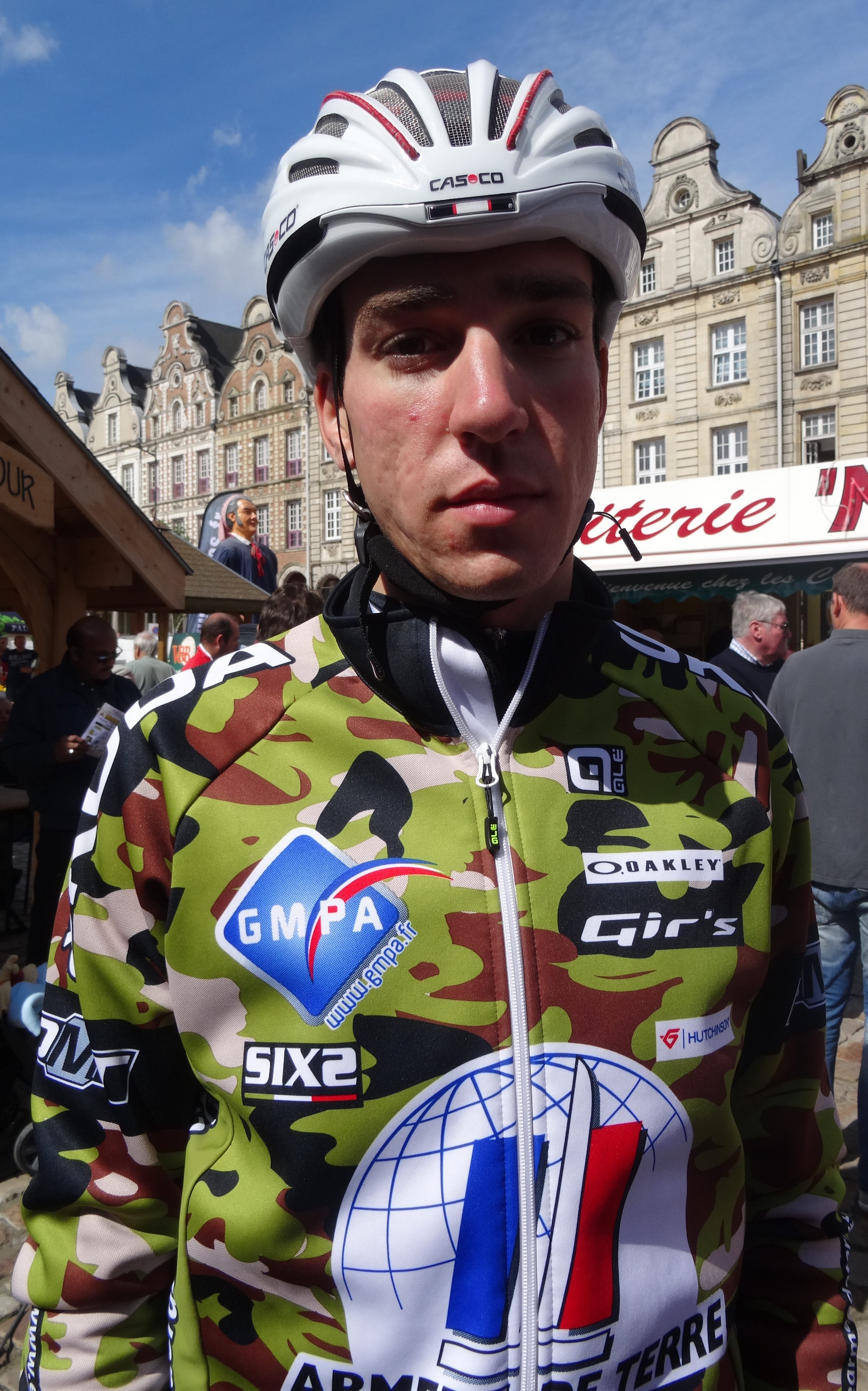 Reportage photographique réalisé le dimanche 25 mai 2014 à l'occasion du départ et de l'arrivée de la troisième étape du Paris-Arras Tour 2014 à Arras, Pas-de-Calais, Nord-Pas-de-Calais, France. Depicted person: Bruno Armirail